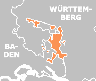 Hohenzollern-Sigmaringen 1848